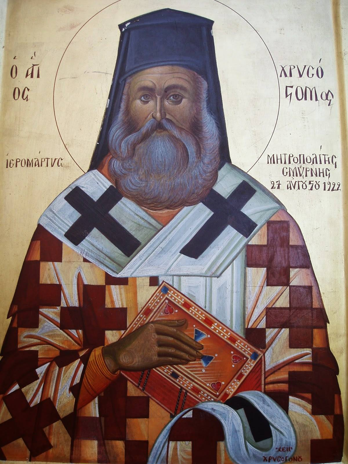 Ο Άγιος Χρυσόστομος Μητροπολίτης Δράμας (1902-1910) και Σμύρνης (1910-1922)